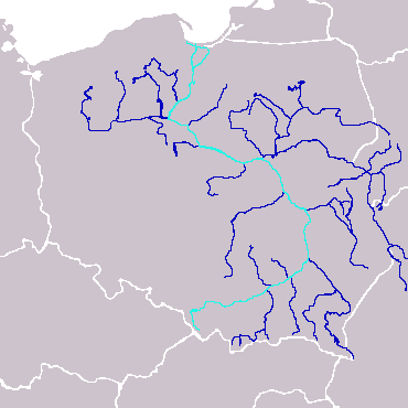 Map over Vistula